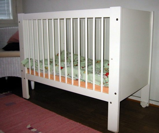 Muuramen valmistama lasten pinnasänky.